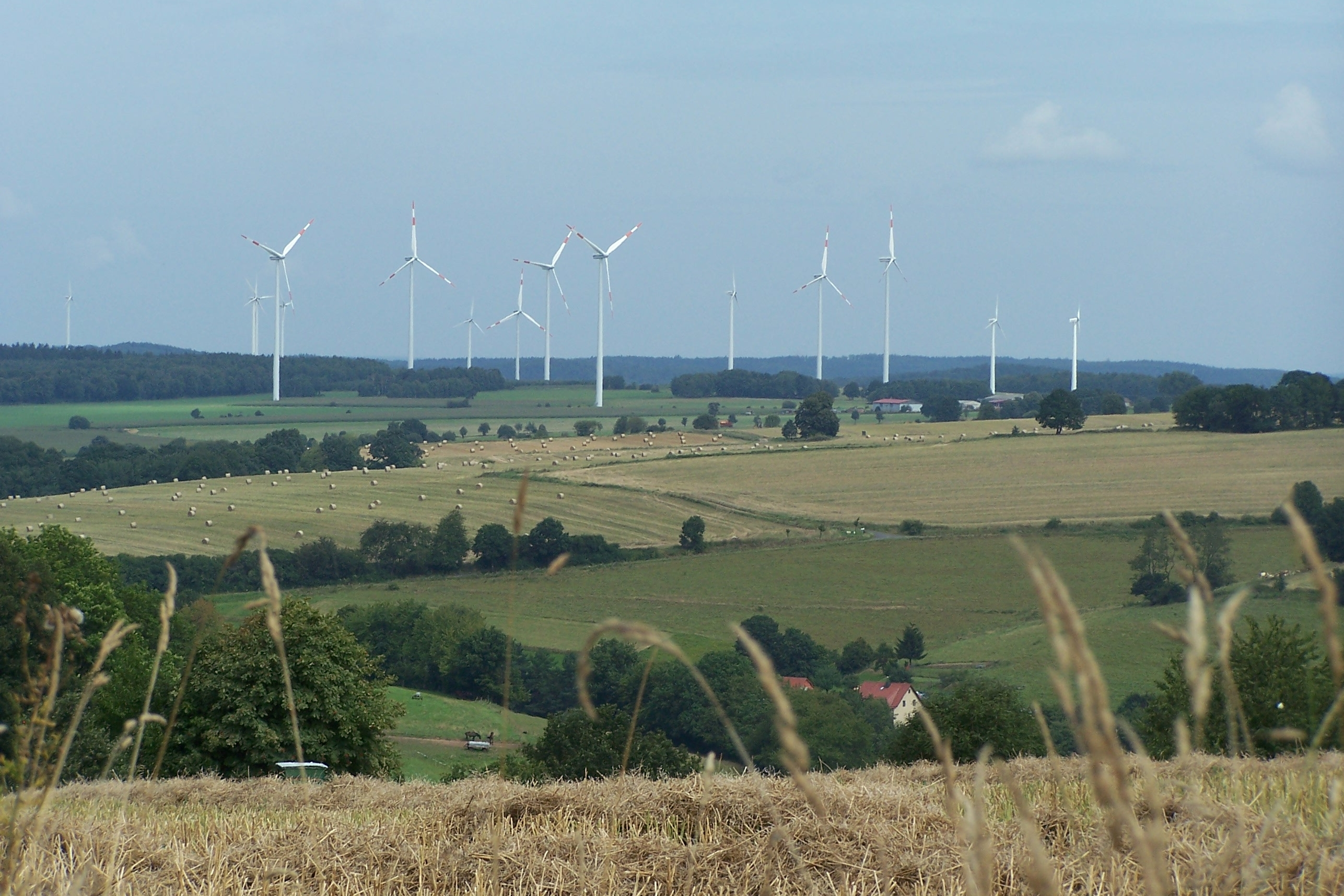 Der Windpark bei Dorndorf.